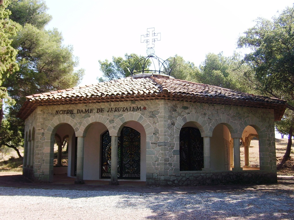 Chapelle Notre-Dame-de-Jérusalem, dite Chapelle Cocteau, Fréjus (83)